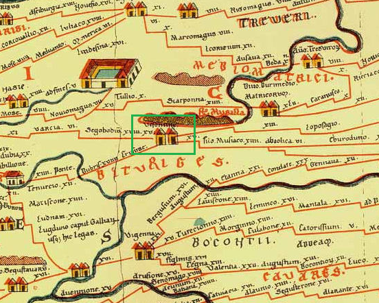 Zoom de la table de Peutinger sur Vesontio (Vesontine - Besançon)